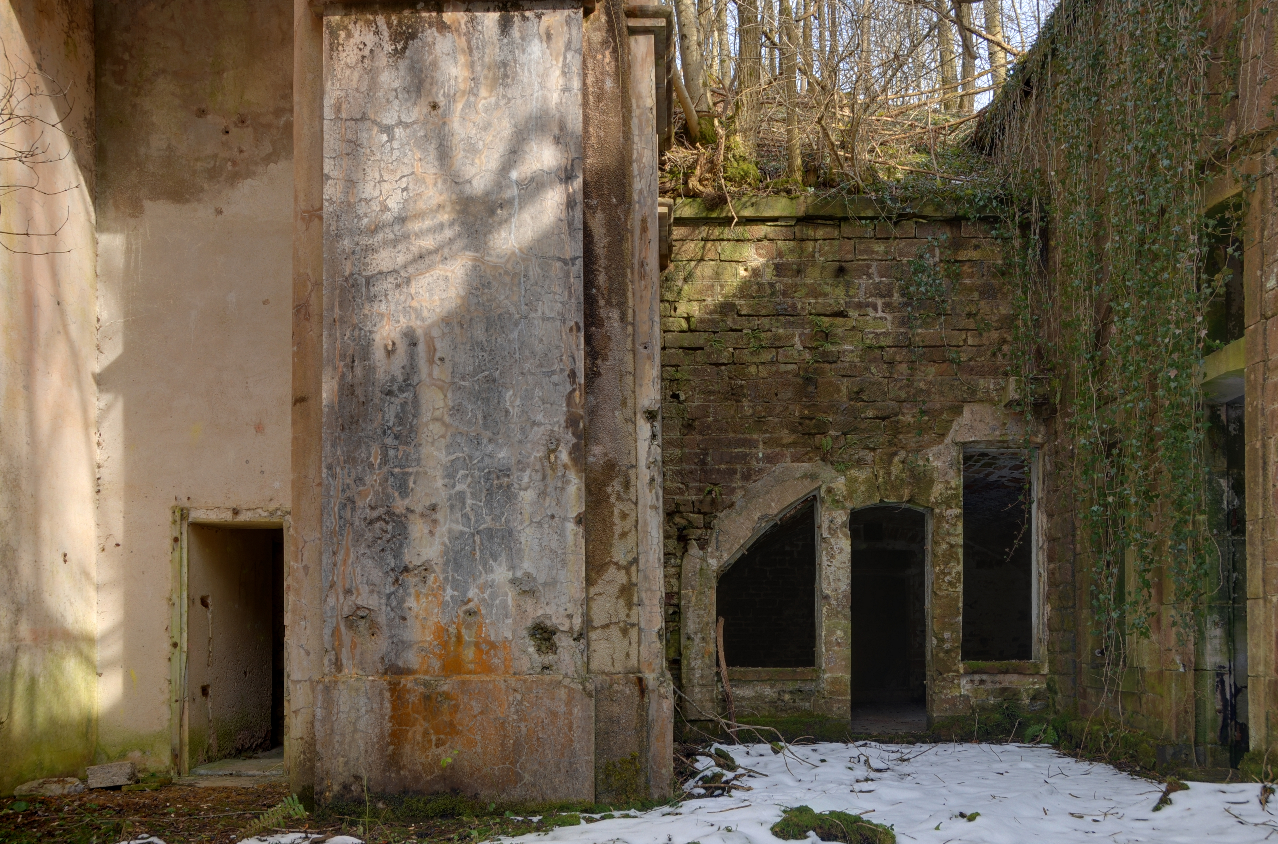 Extrémité Est de la cour intérieure : à gauche, le casernement de guerre ; à droite, le casernement de paix. Roppe fortifications (HDR).